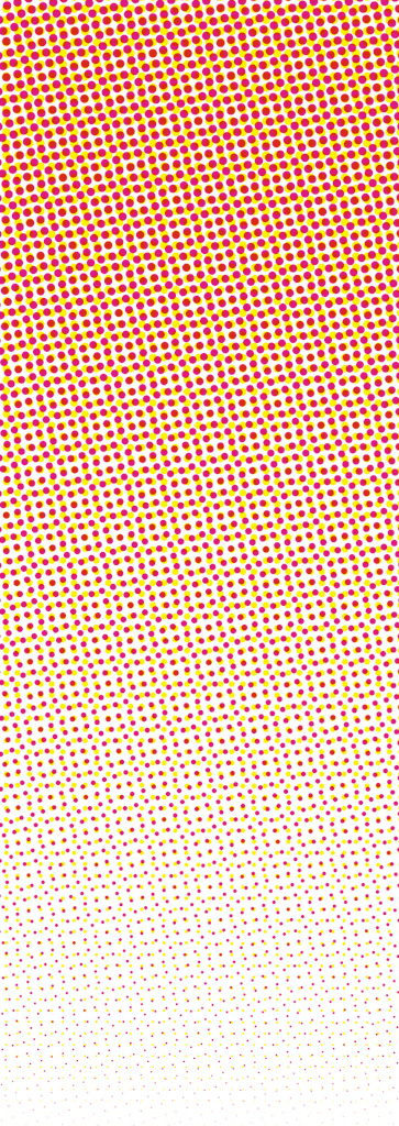 Rot, Zusammendruck von Gelb und Magenta